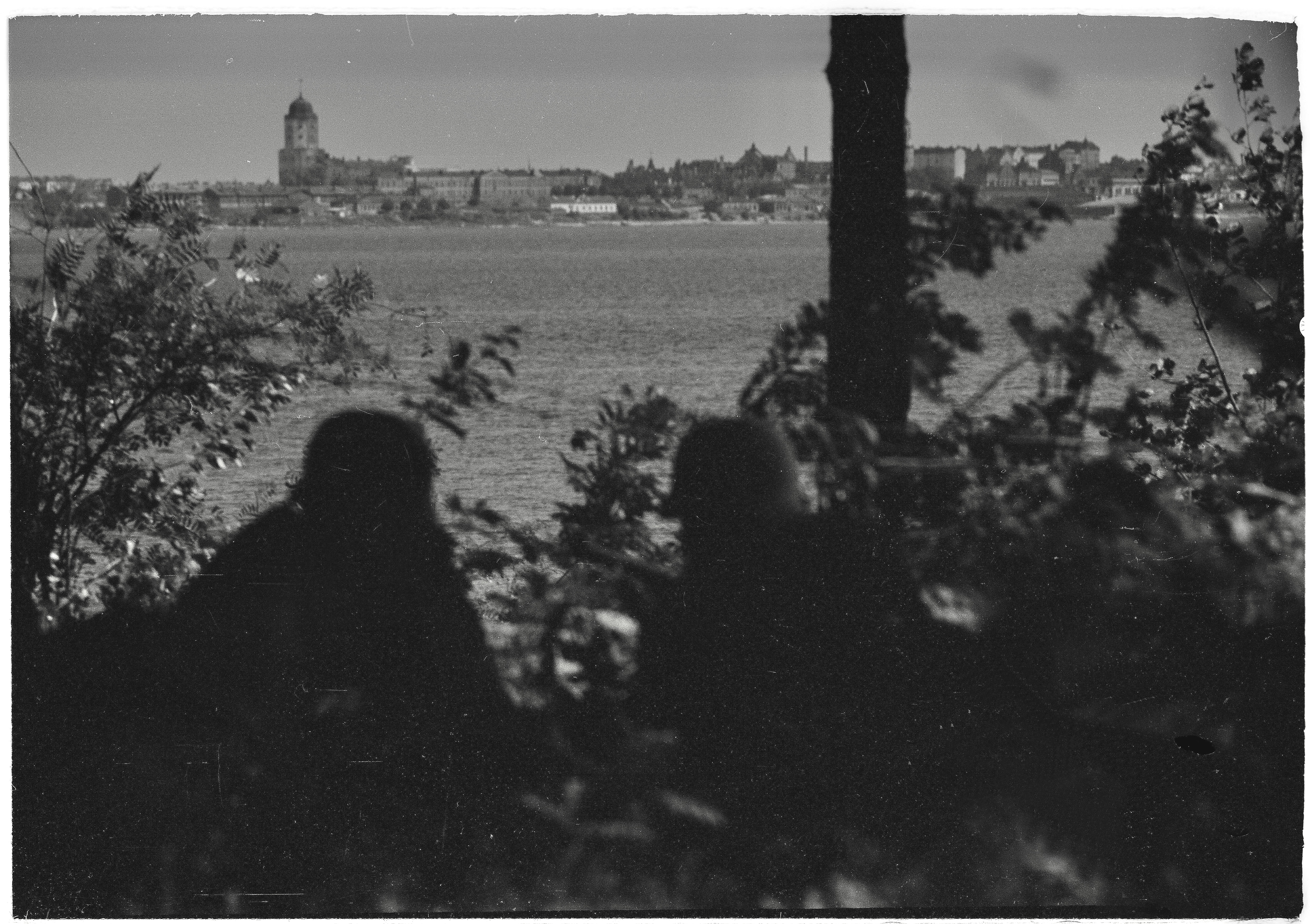 Viipuri nähtynä Viipurin lahden länsipuolelta. Kaupungin laitaosissa venäläisten sytyttämiä tulipaloja.Sorvali 1944.07.04